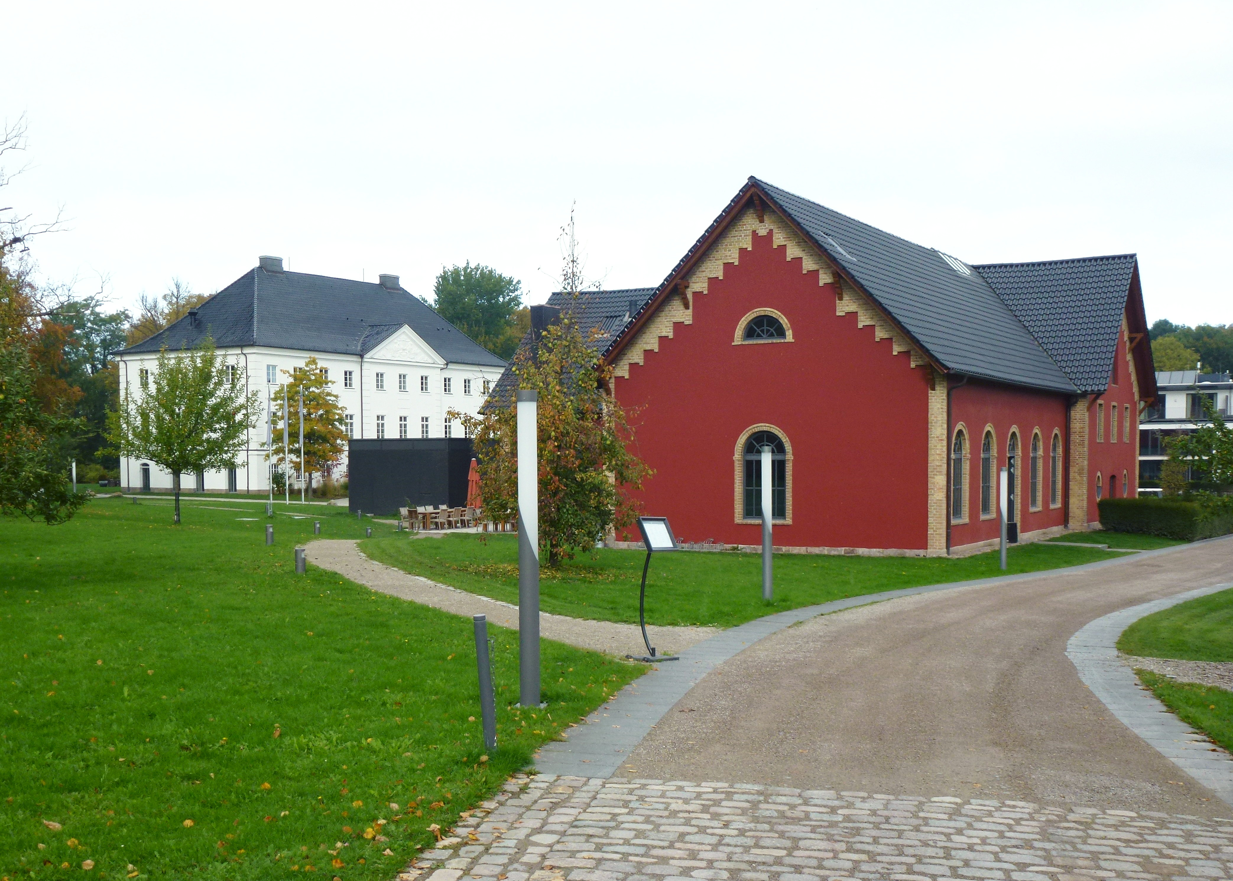 Schlossgut Groß-Schwansee, Hauptgebäude und ehemaliger Pferdestall